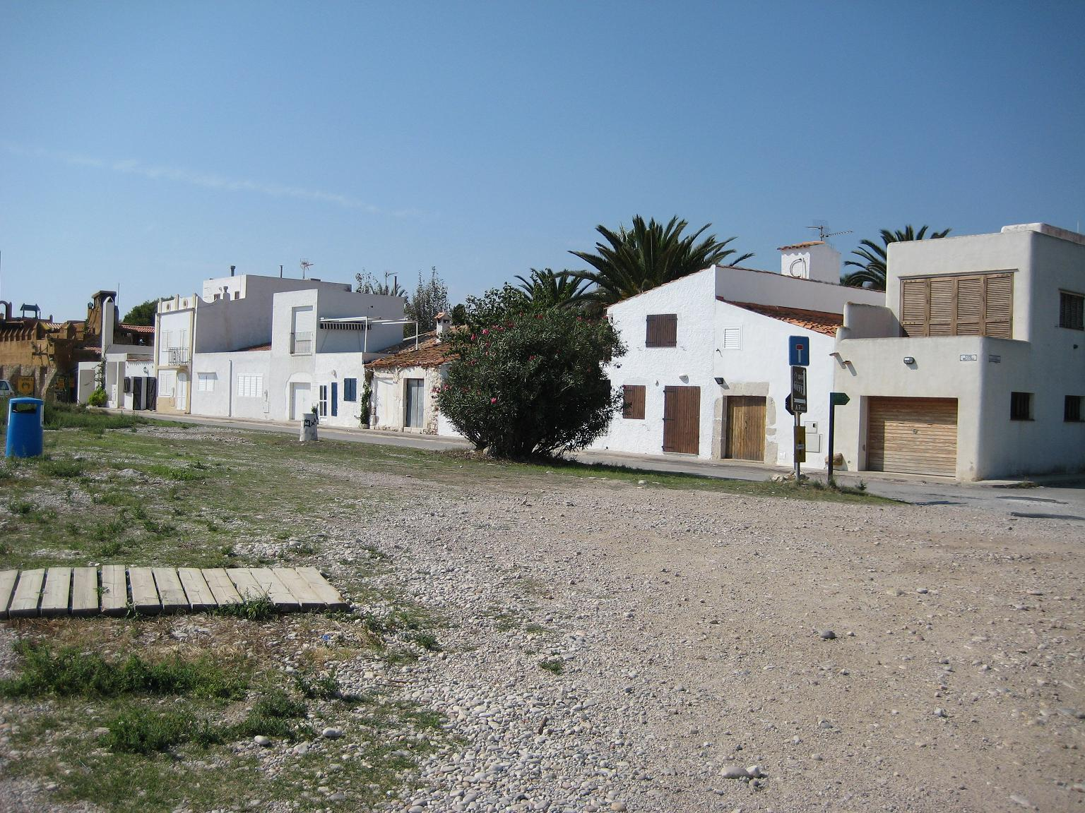 Capicorb, nucli poblacional d'Alcalà de Xivert